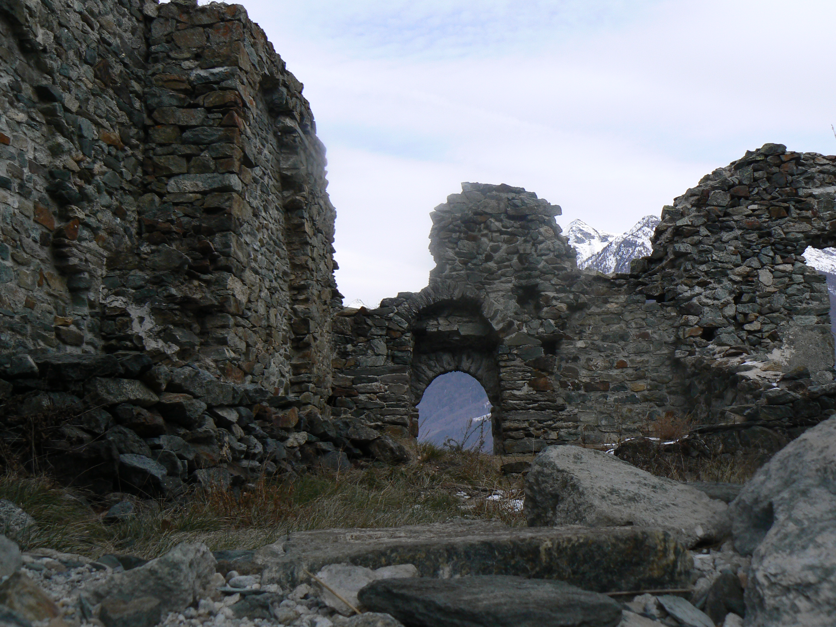 Castello di Villa, Challad-Saint-Victor, Valle d'Aosta, Italia.